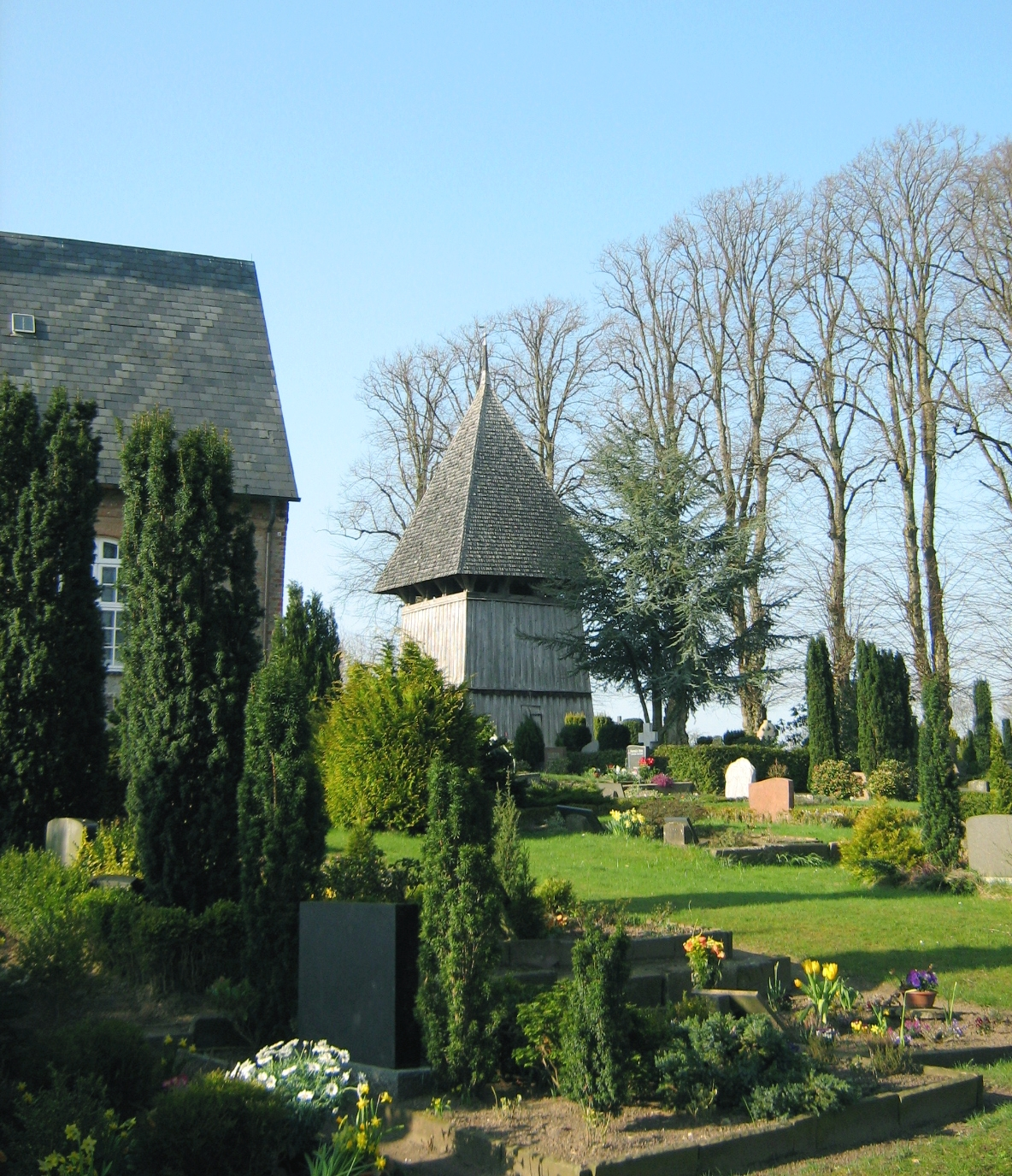 Glockenstapel der St.-Marien-Kirche Norderbrarup